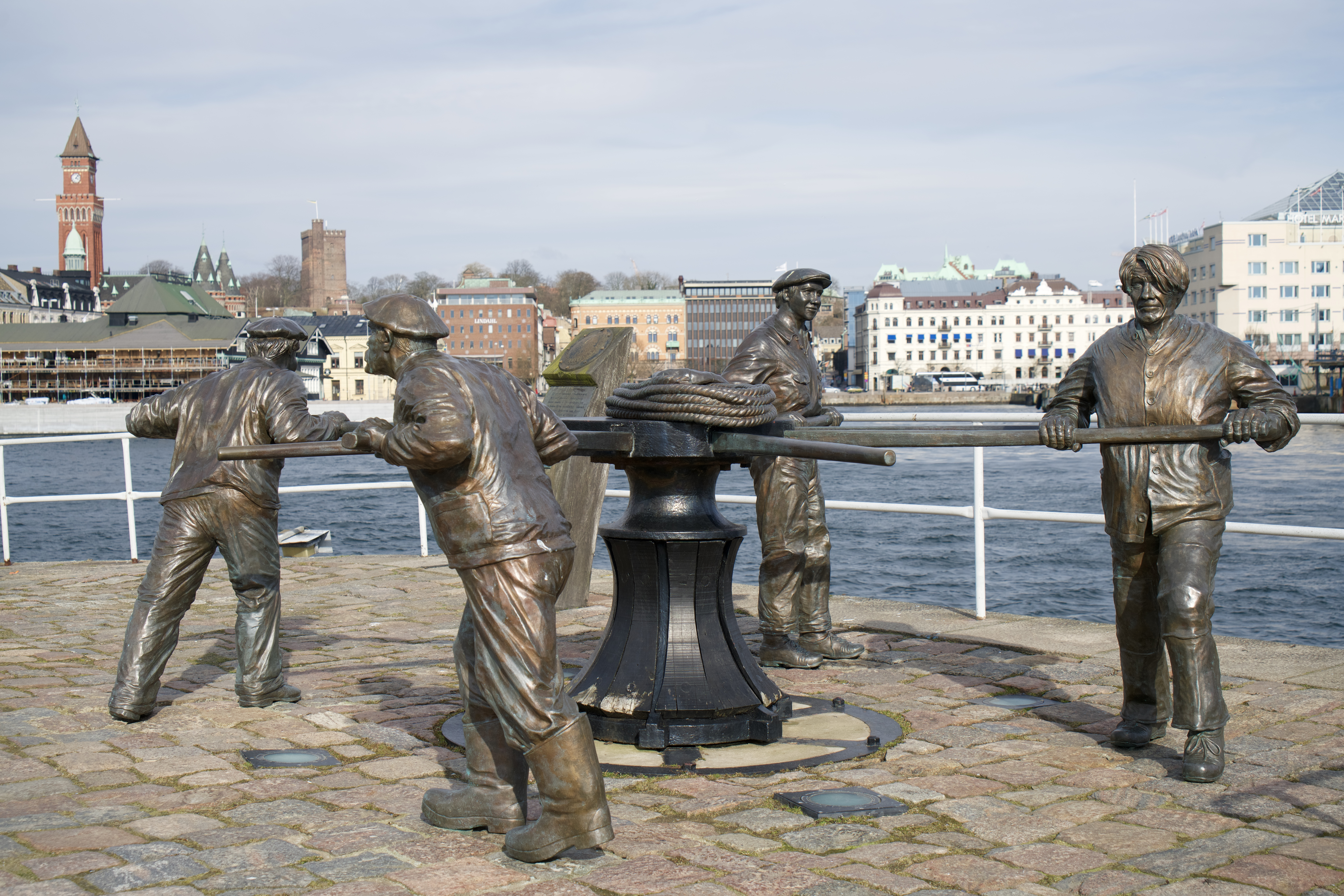 Gångspelet (1994) - Risto Karvinen It is not clear whether freedom of panorama applies to this image. This is a depiction of a building or work of art in Sweden. The depicted work is believed to be protected by copyright. According to Article 24 of the Swedish copyright act, "Works of art may be depicted if they are permanently placed on or at a public place outdoors. Buildings may be freely depicted." It has been widely accepted that this provision made distribution of depictions such as this one legal. On 4 April 2016, however, the Supreme Court of Sweden issued a statement that Article 24 does not extend to publication in online repositories, and on 6 July 2017, a lower court ruled that linking to depictions of copyrighted artworks hosted on Commons constitutes copyright infringement. See COM:CRT/Sweden#Freedom of panorama for more information. The implications of these decisions on Commons' ability to continue to distribute this and other depictions like it are currently under analysis. Reusing or linking to this file may have legal consequences. You are solely responsible for ensuring that you do not infringe the copyright belonging to someone else. See our general disclaimer for more information.